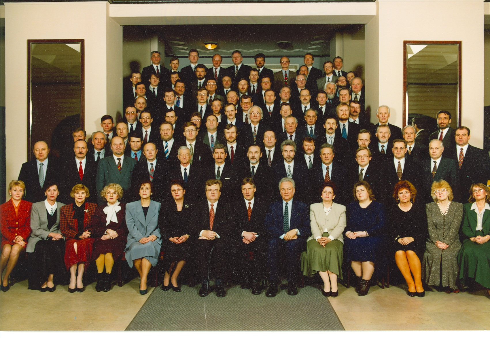 VIII Riigikogu koosseisu avapilt.